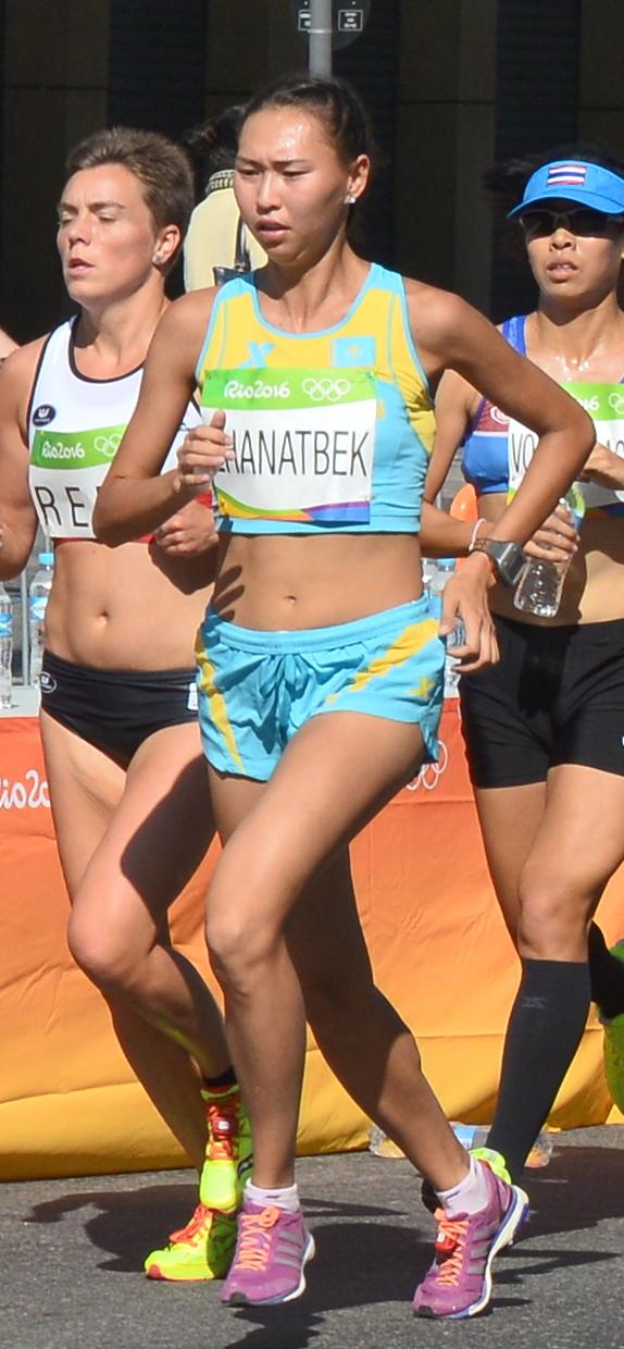 Passage du marathon des jeux olympiques de Rio 2016 dans le centre de Rio